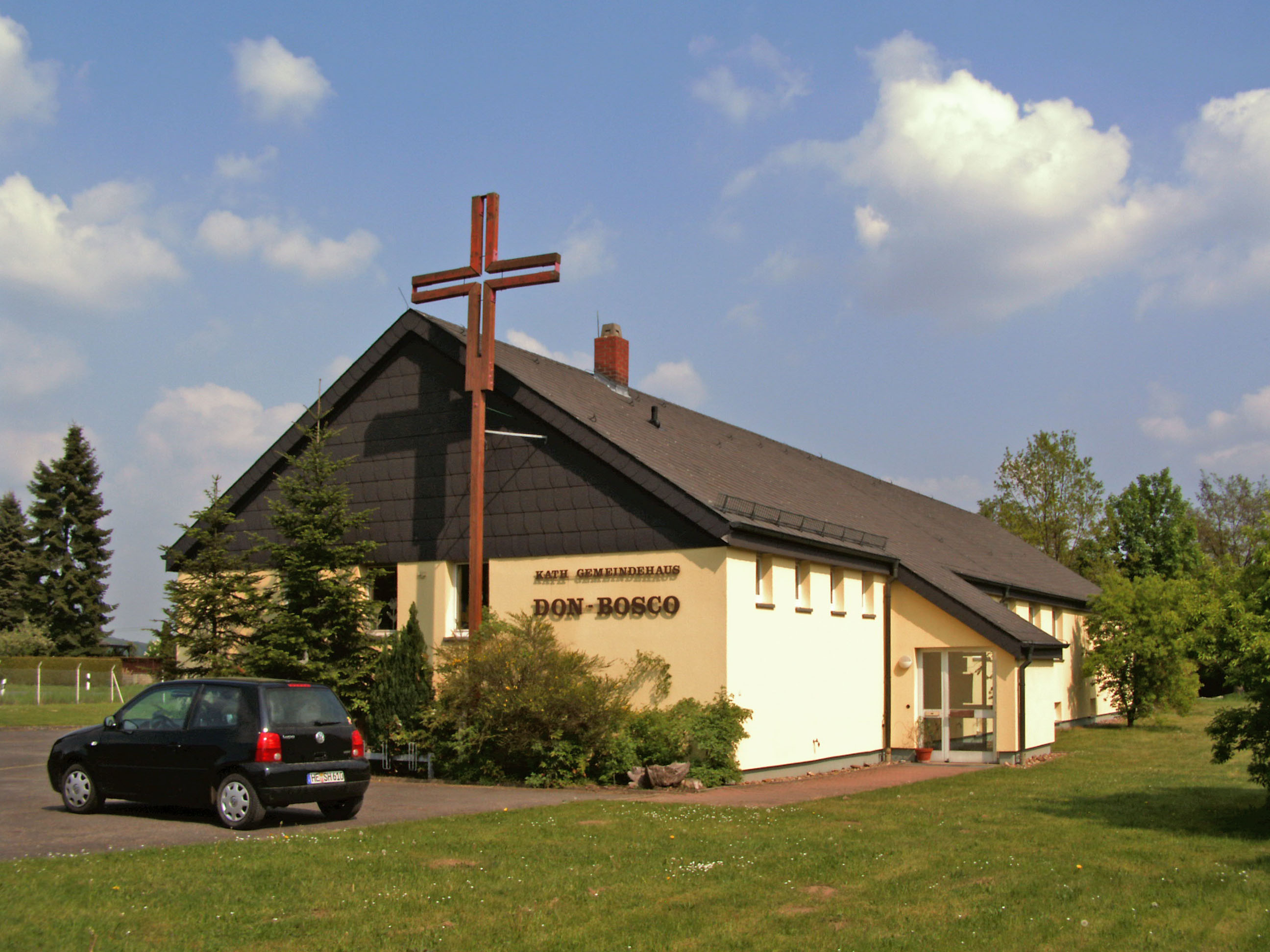 Katholische Kirche Hl. Don Bosco in Braunschweig, Stadtteil Hondelage